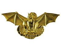 特別警備隊員き章